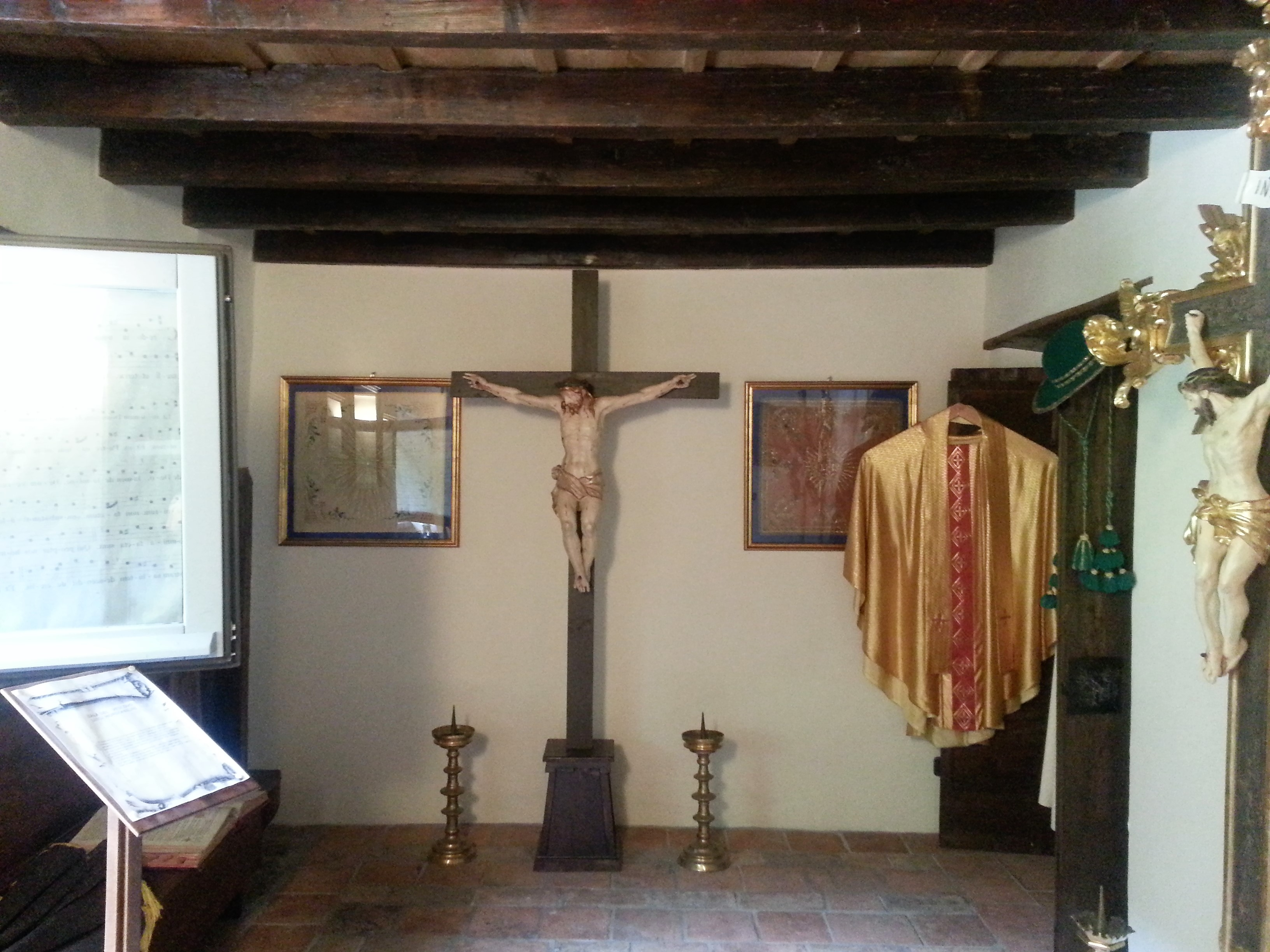 Sala Mortabilini -.museo parrocchiale